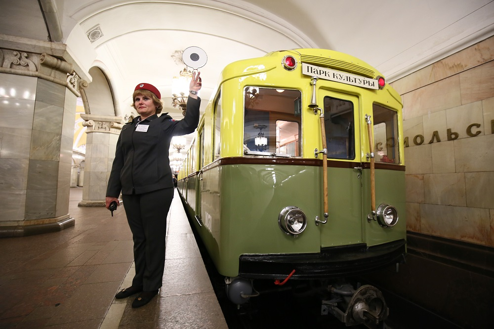 Электропоезд метро А с вагонами 1031 и 1 на станции Комсомольская